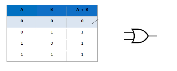 Tablica istinitosti i oznaka za disjunkciju.